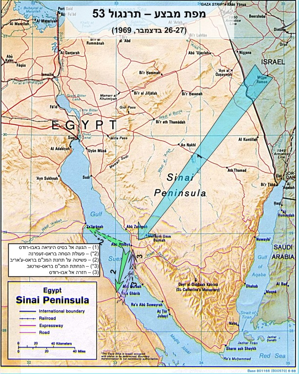 מפת חצי-האי סיני עם מהלכי מבצע "תרנגול 53"